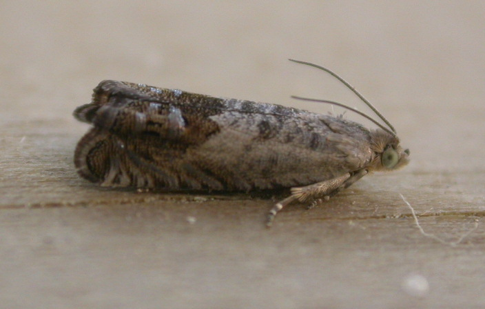 Cydia succedana, Gastes, Landes, SW France, 28/29 June 2003